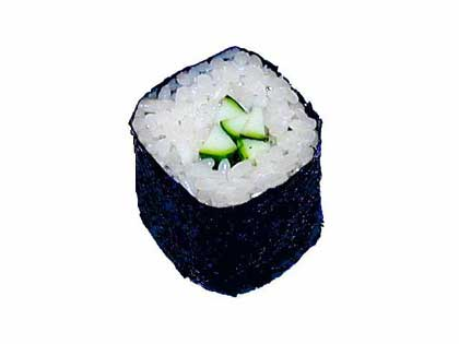 Hosomaki Sushi